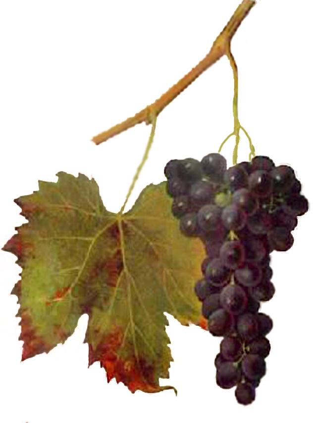 Grappe de Schiava par Viala et Vermorel